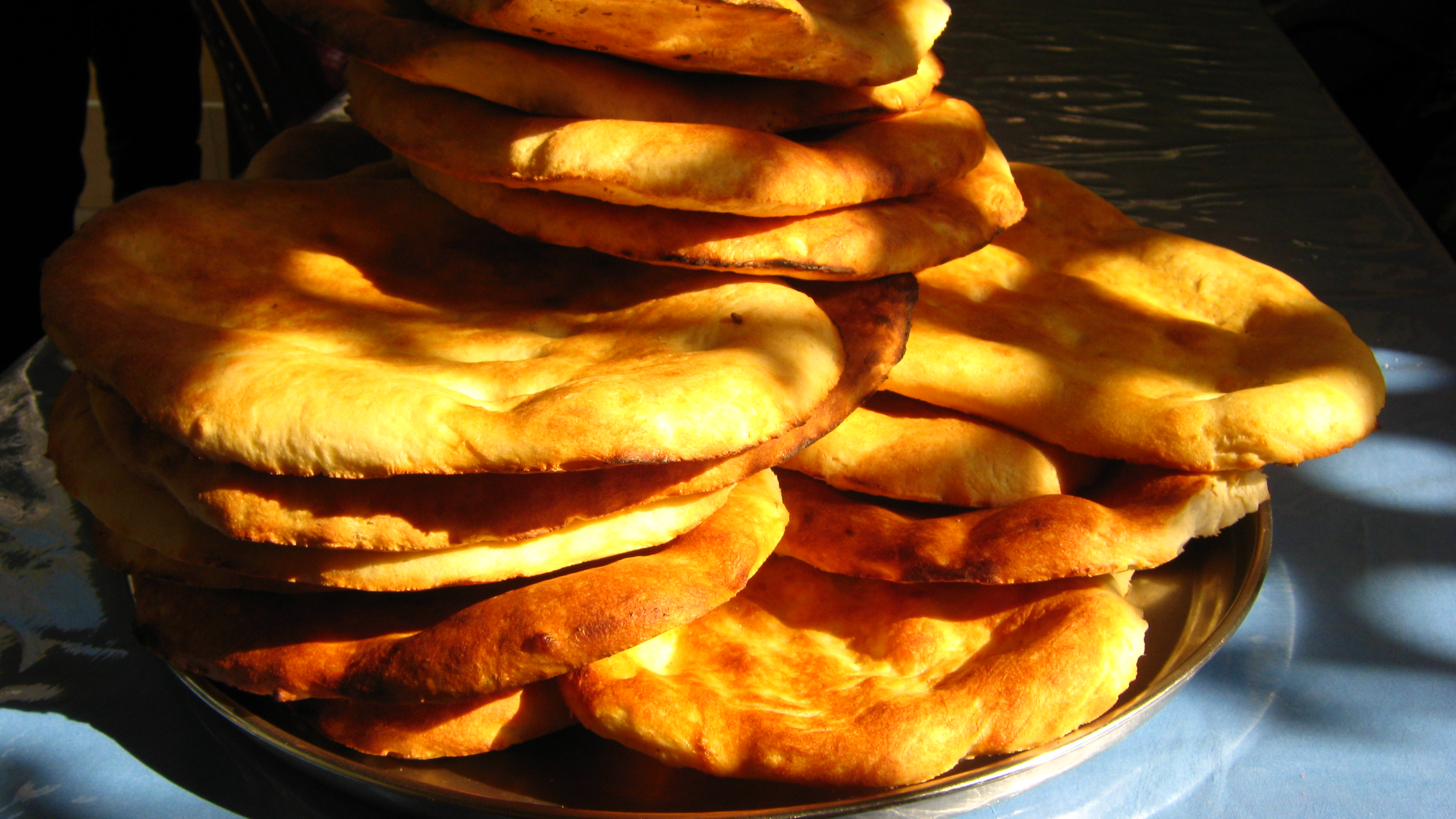 Salyan çörəyi